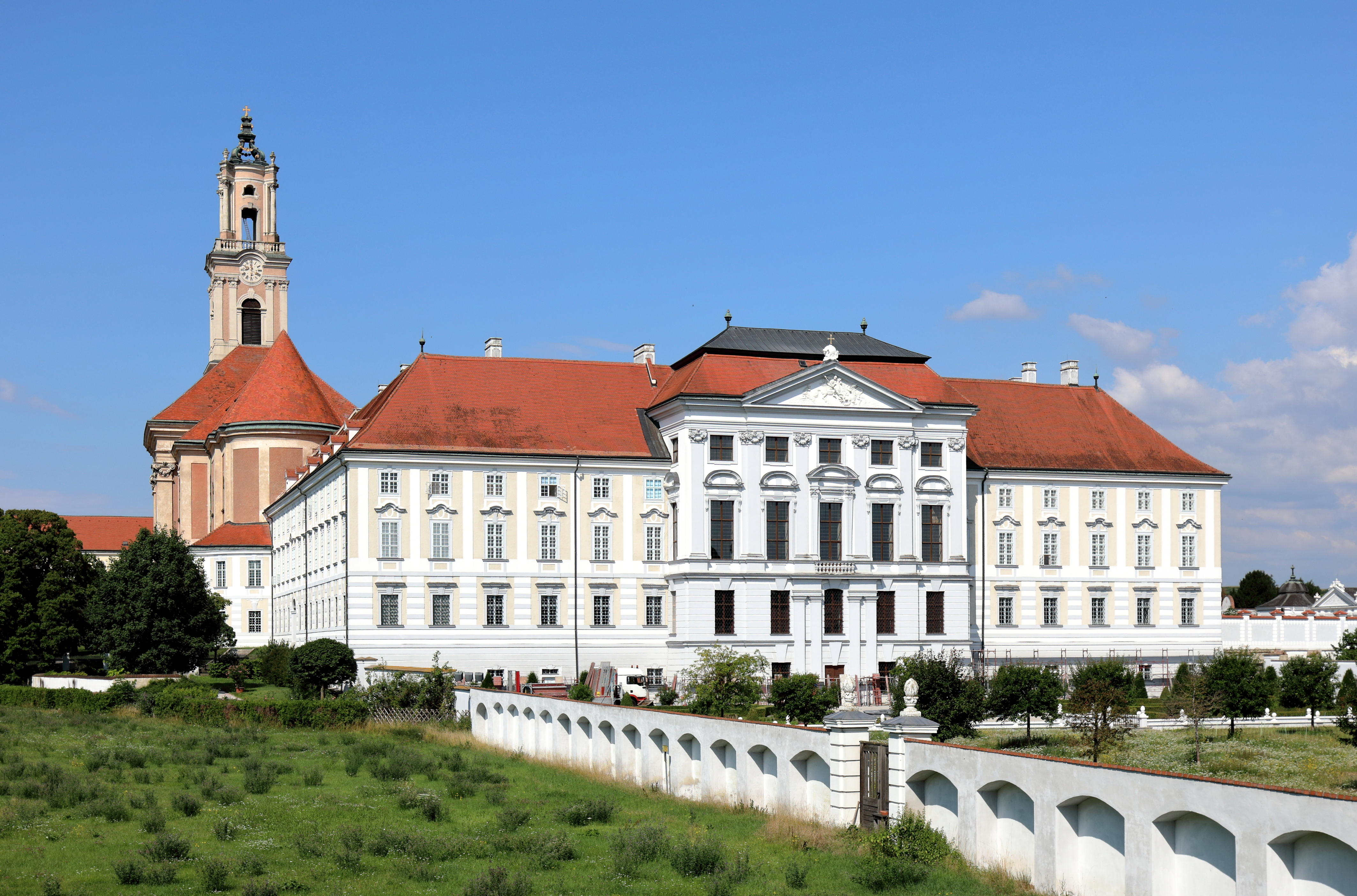 Ostansicht des Augustiner-Chorherrenstiftes in der niederösterreichischen Stadt Herzogenburg.Das Kloster wurde 1112 durch Ulrich I. von Passau in St. Georgen an der Traisen am Zusammenfluss der Traisen mit der Donau gegründet und 1244 nach Herzogenburg verlegt. In der ersten Hälfte des 18. Jahrhundert erfolgte ein weitgehender Neubau des Stiftes, inklusive der Kirche, und erhielt dabei im Wesentlichen sein heutiges Erscheinungsbild.